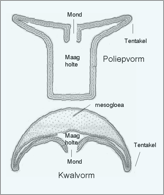 Kwal/Poliep